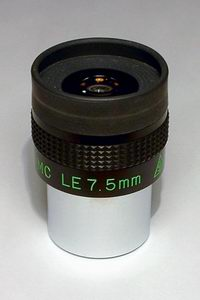 7.5mm Takahashi LE eyepiece Oculaire Takahashi LE de 7,5 mm